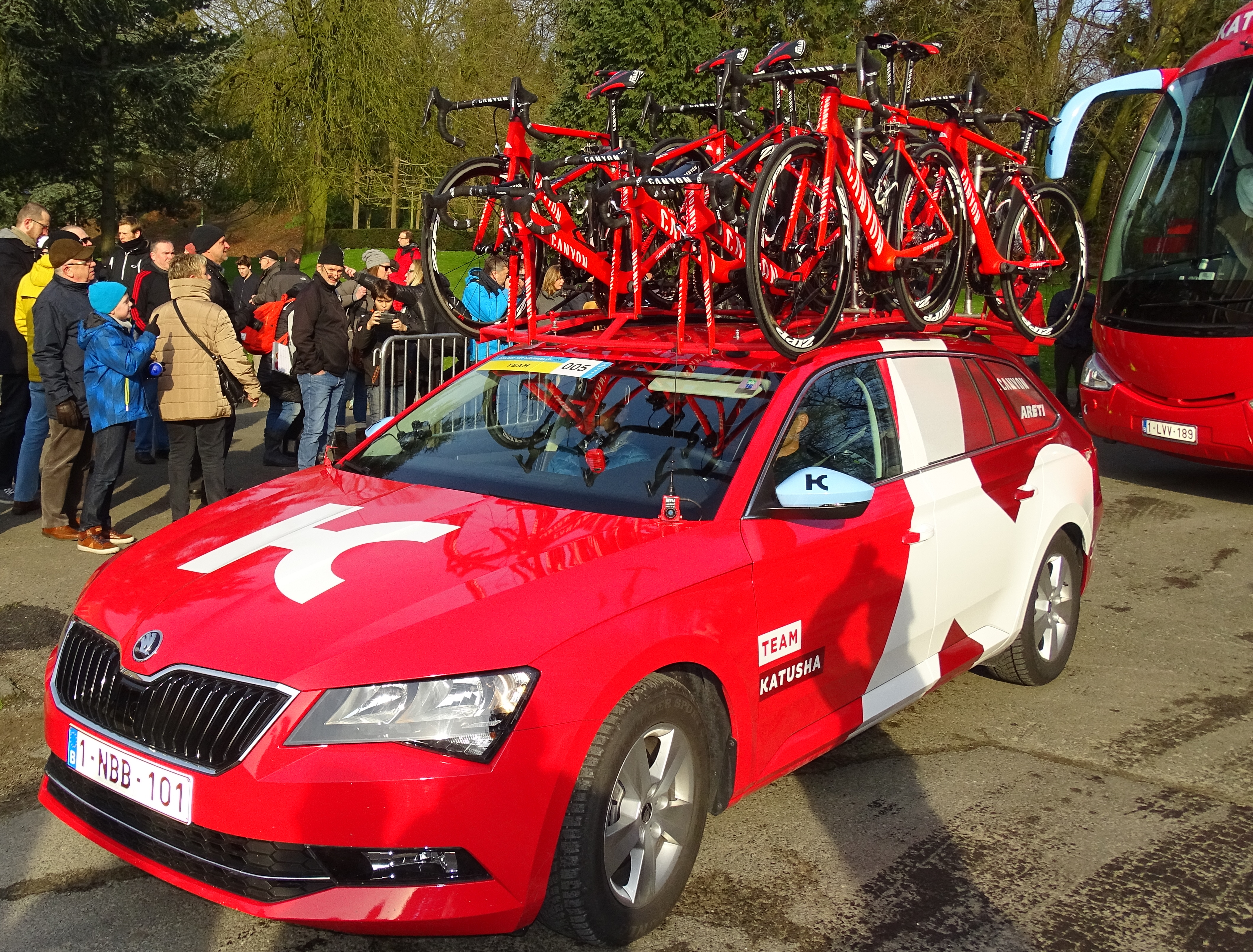 Reportage réalisé le samedi 27 février à l'occasion du départ et de l'arrivée du Circuit Het Nieuwsblad 2016 et de l'arrivée du Circuit Het Nieuwsblad féminin 2016 à Gand, Belgique.